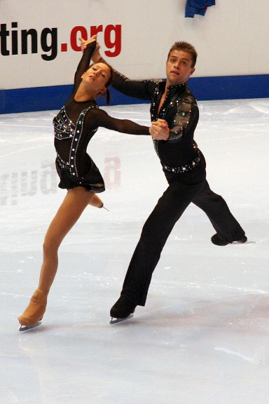 Dominika Piątkowska and Dmitri Khromin at the 2006 Skate America.